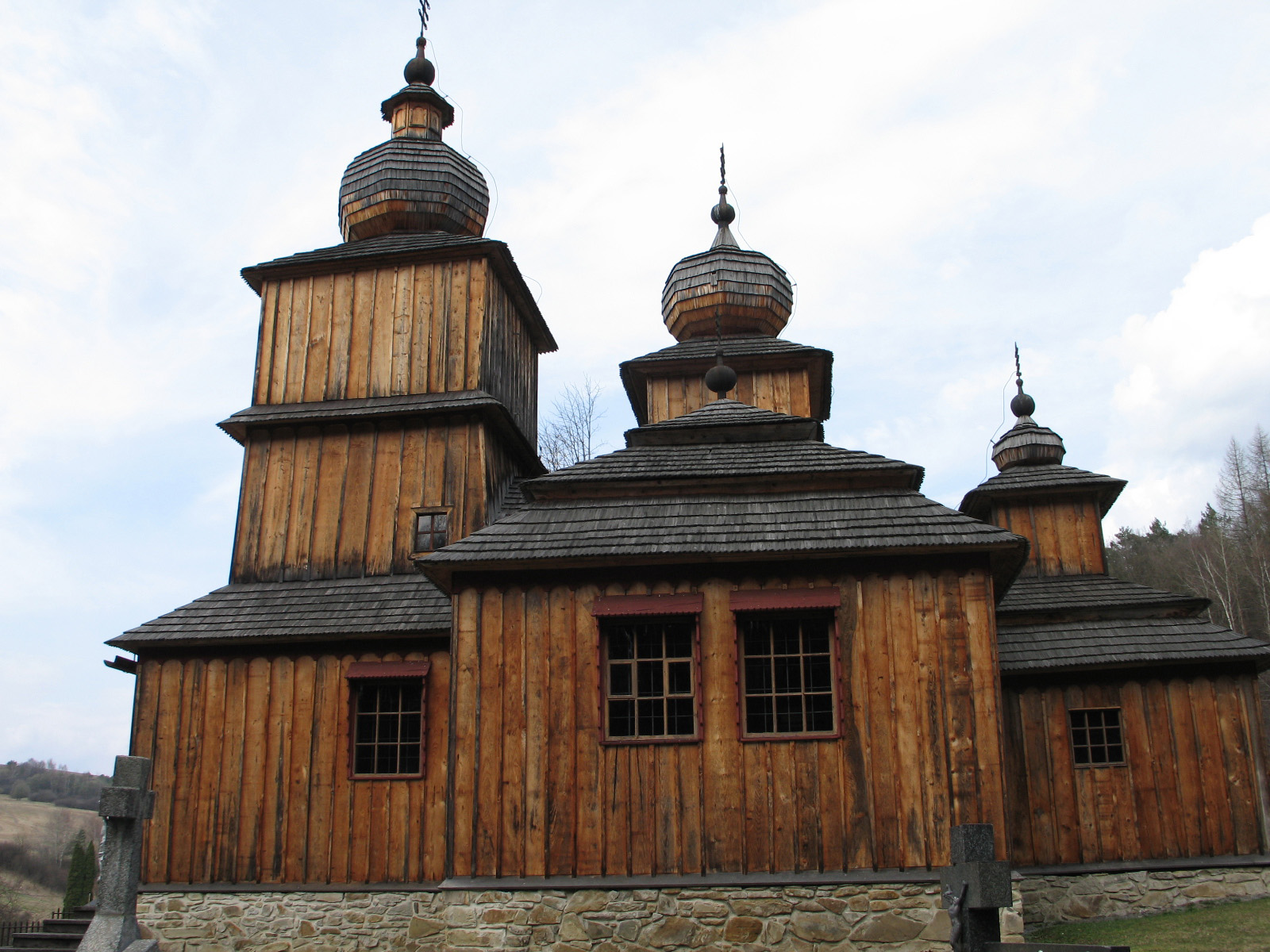 Gréckokatolícka cerkva v Dobroslave This medium shows the protected monument with the number 712-172/0 in the Slovak Republic.